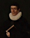 Georg Heinrich Henrici (1770-1851), zeitgenössisches Porträt als Stadtsuperintendent, im Besitz der Marktkirchengemeinde Goslar, Ausschnitt